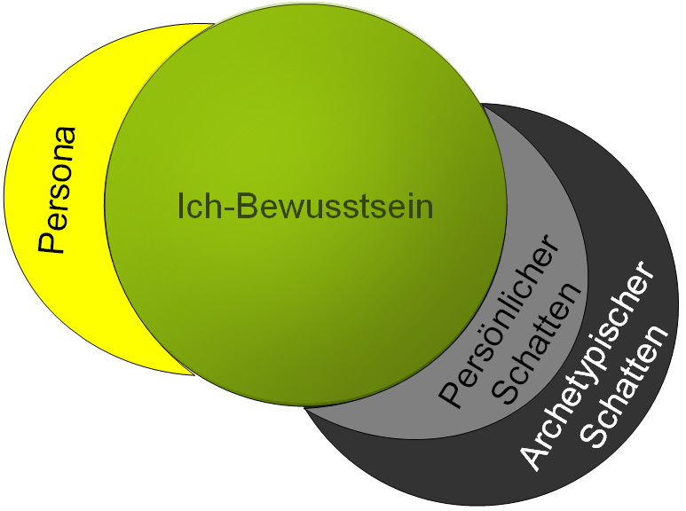 Die Grafik zeigt modellhaft das Konzept des Schattens (nach C.G. Jung) in seiner Beziehung zu Ich-Bewusstsein und Persona. Sie wurde von mir für die Wikipedia erstellt.